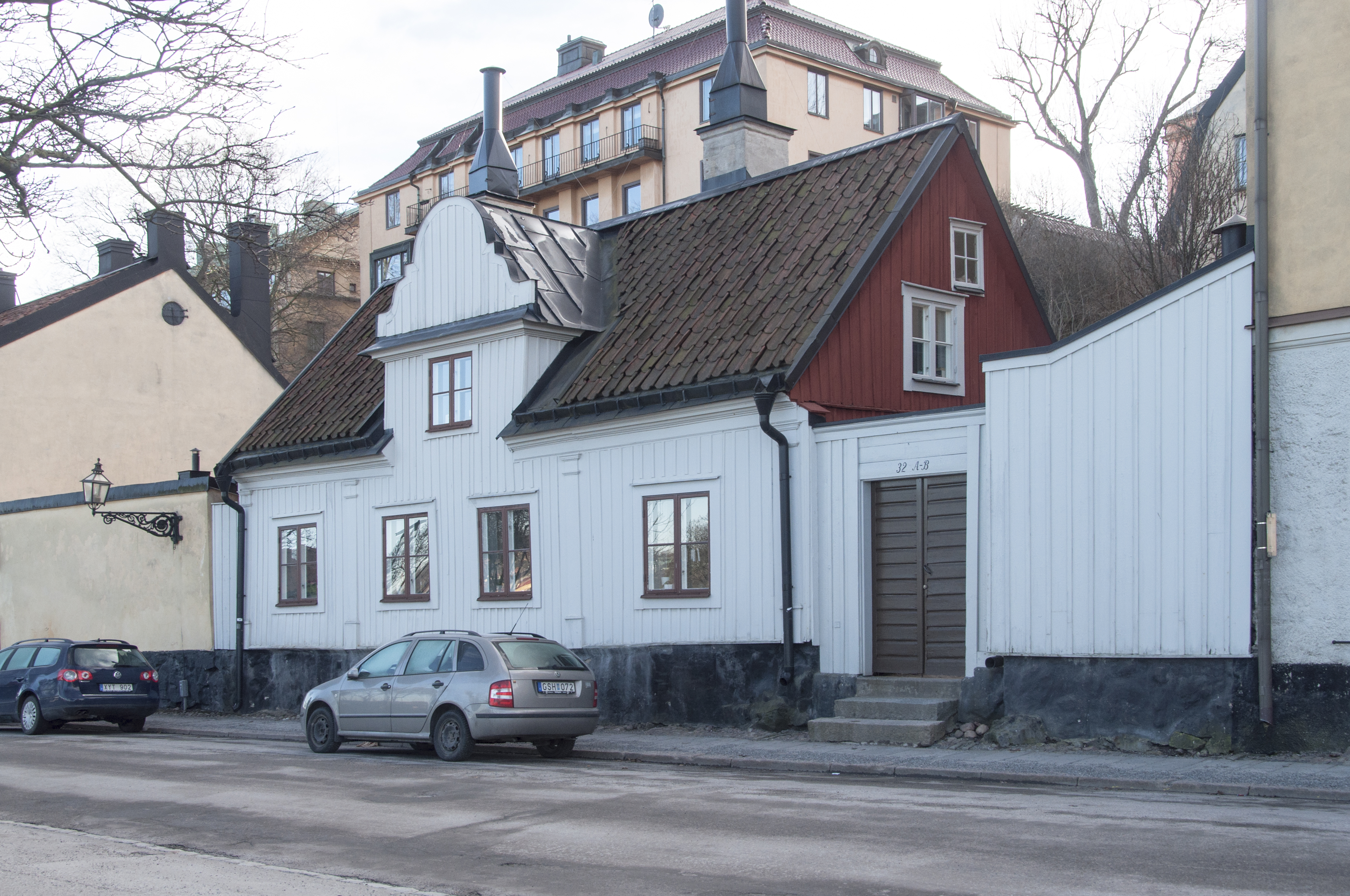 Fjällgatan 32